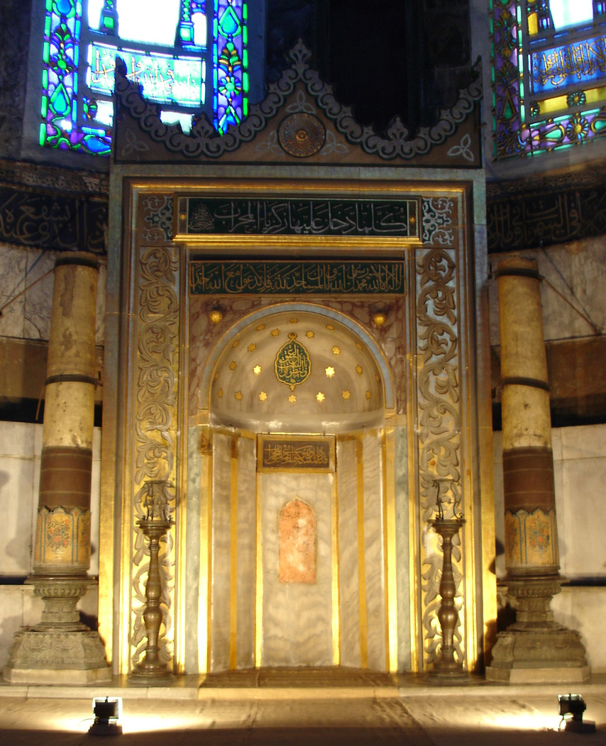 Il mihrab nella ex moschea di Santa Sofia, ad Istanbul. Foto di: Giovanni Dall'Orto, 24-5-2006.